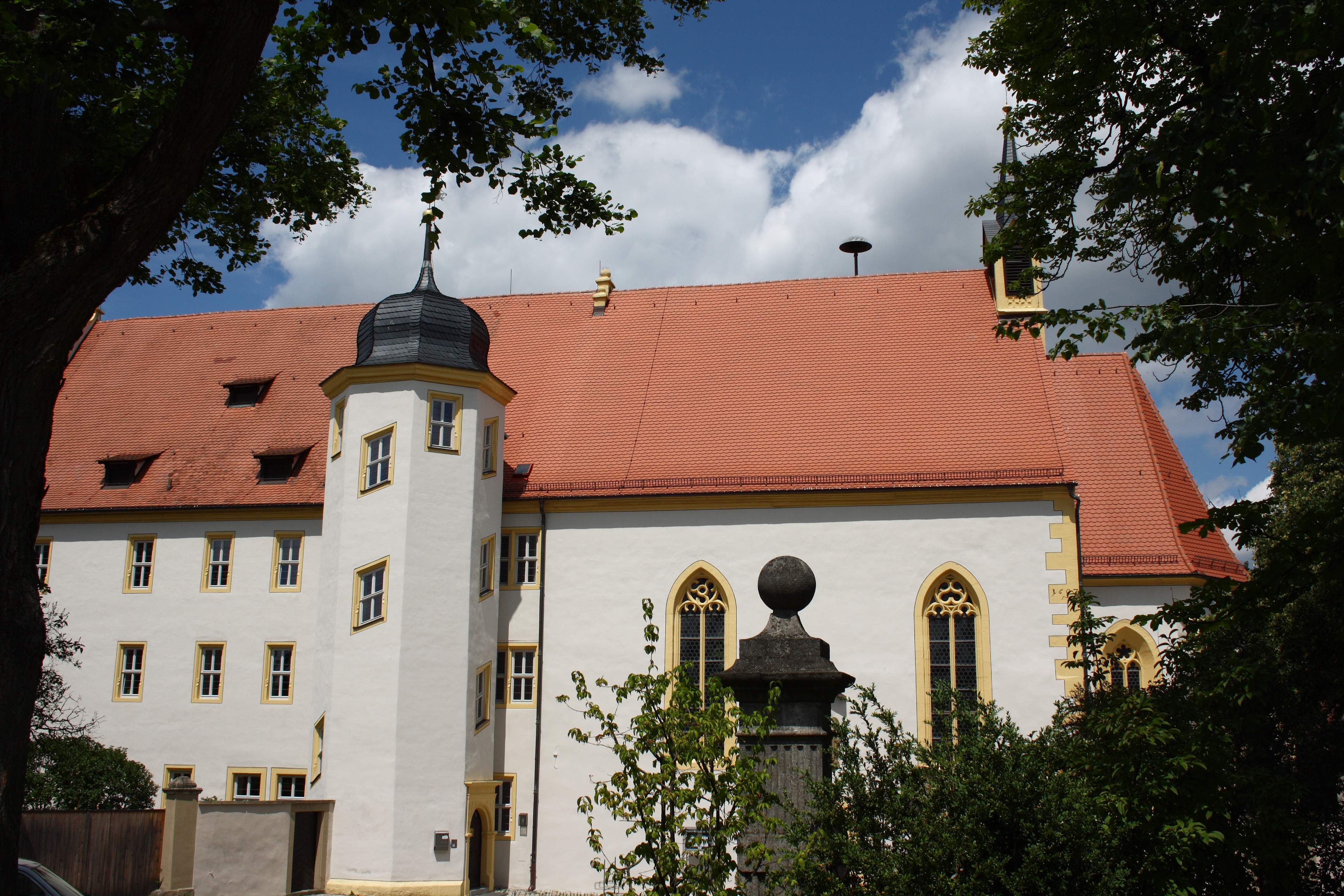 Spitalkirche St. Johann Baptist in Iphofen im Landkreis Kitzingen (Bayern)